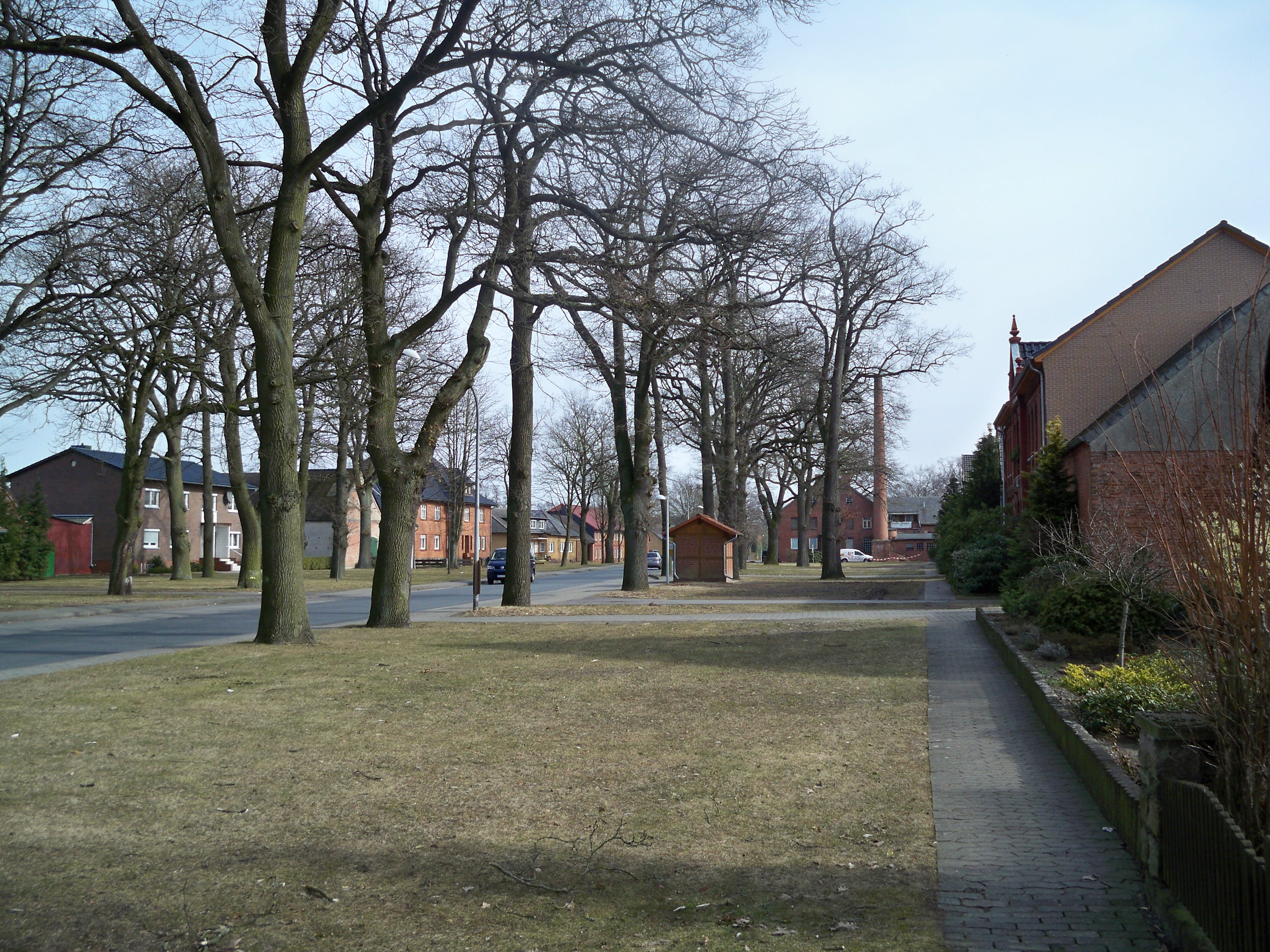 Zasenbeck Hauptstraße Richtung Osten